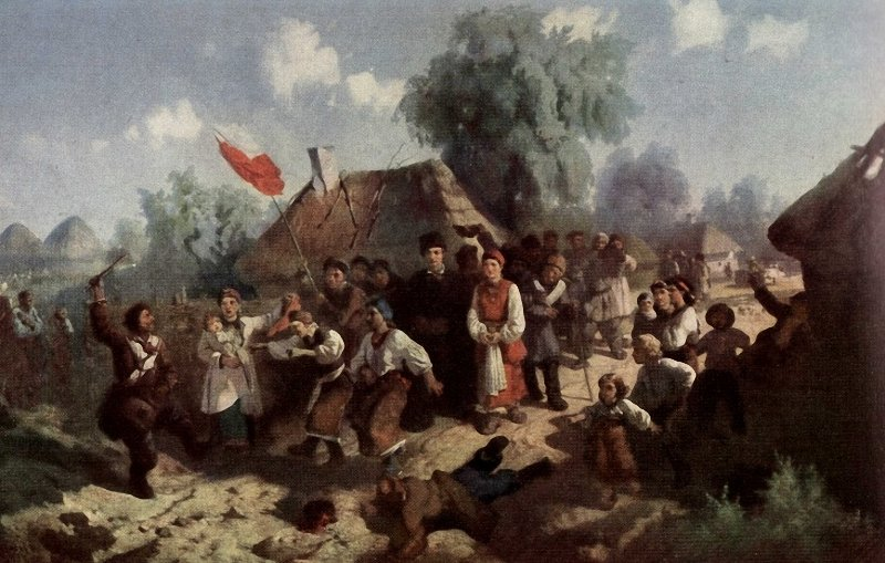 Перезва